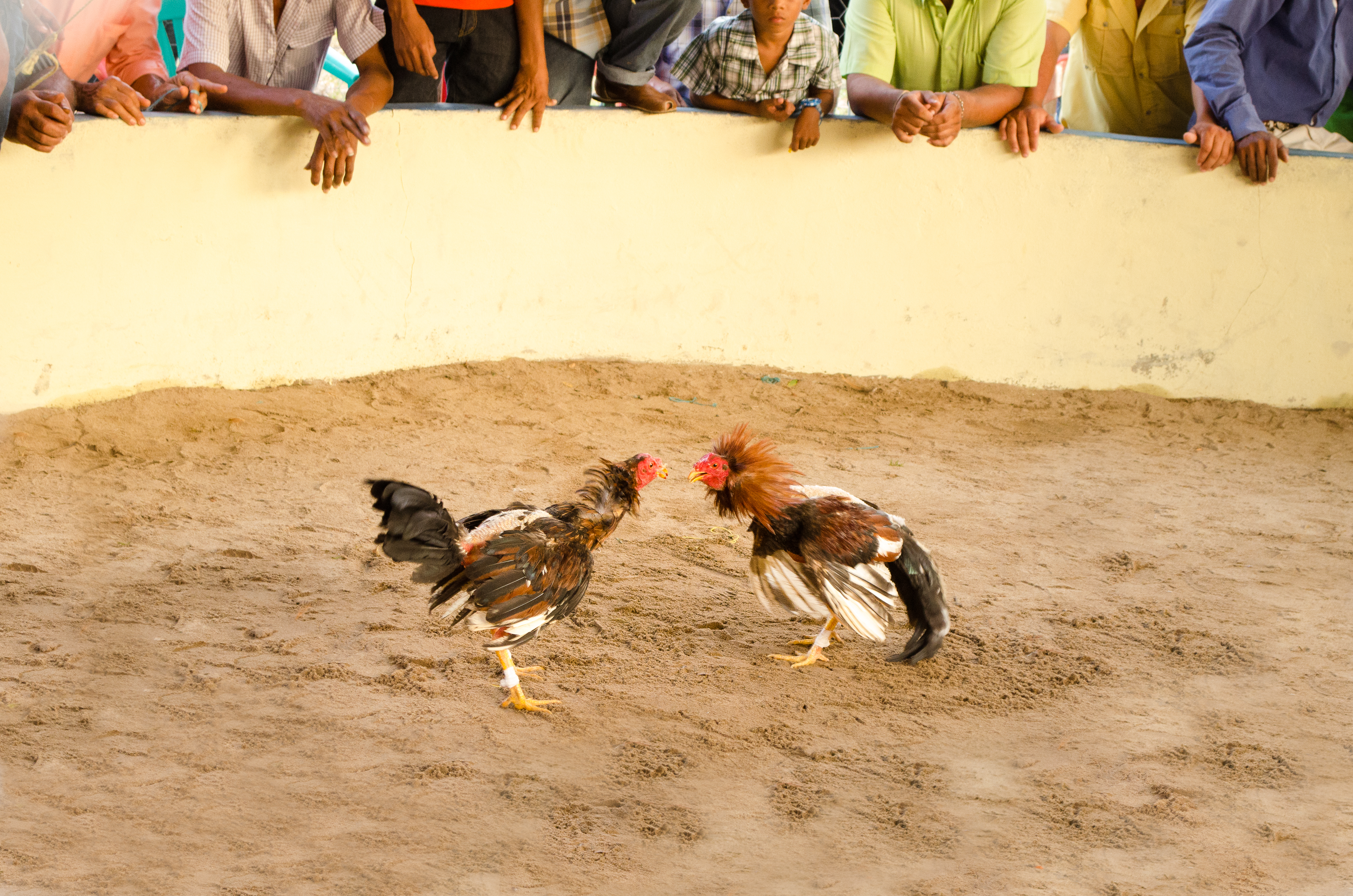 Las peleas de gallos pueden considerarse una tradicion mayormente en poblados llaneros del territorio venezolano. Se puede apreciar un combate en pleno desarrollo. Fotografía capturada en La Trinidad de Orichuna, Estado Apure.